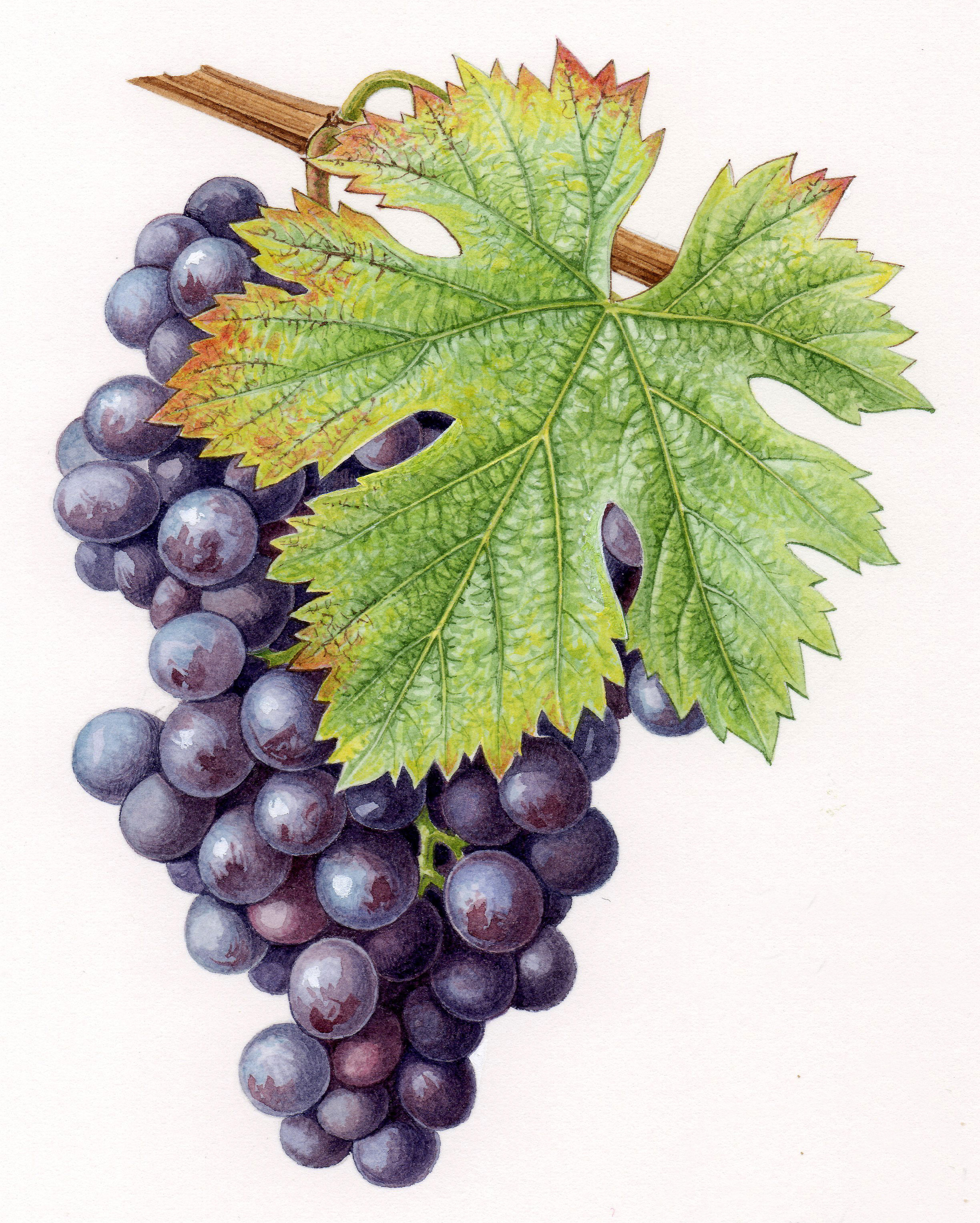 Aquarelle originale pour les Cépages de France (2001)